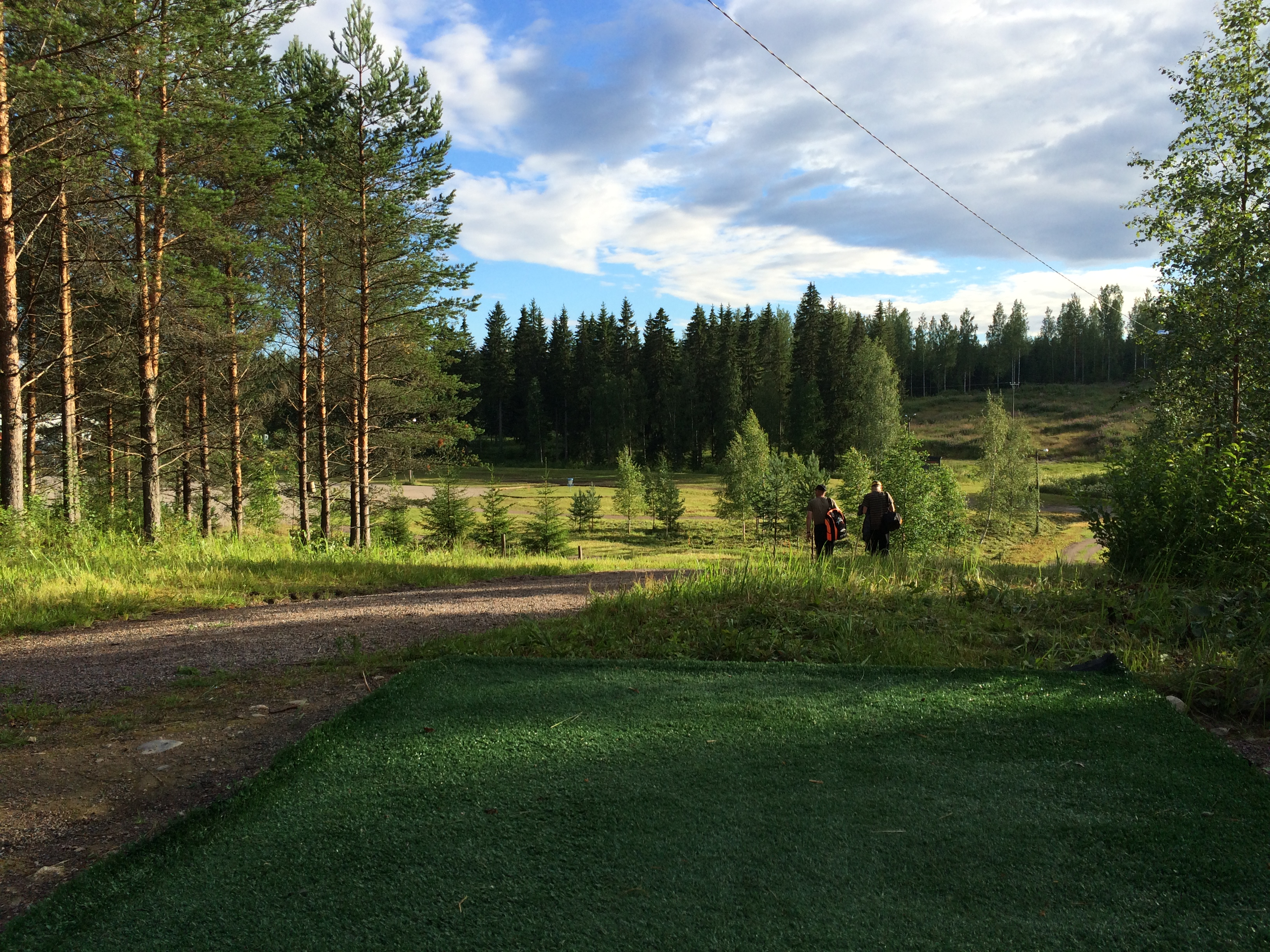 Kuva Mustikkavuoren kisaradan tekonurmisesta heittoalustasta väylältä 20